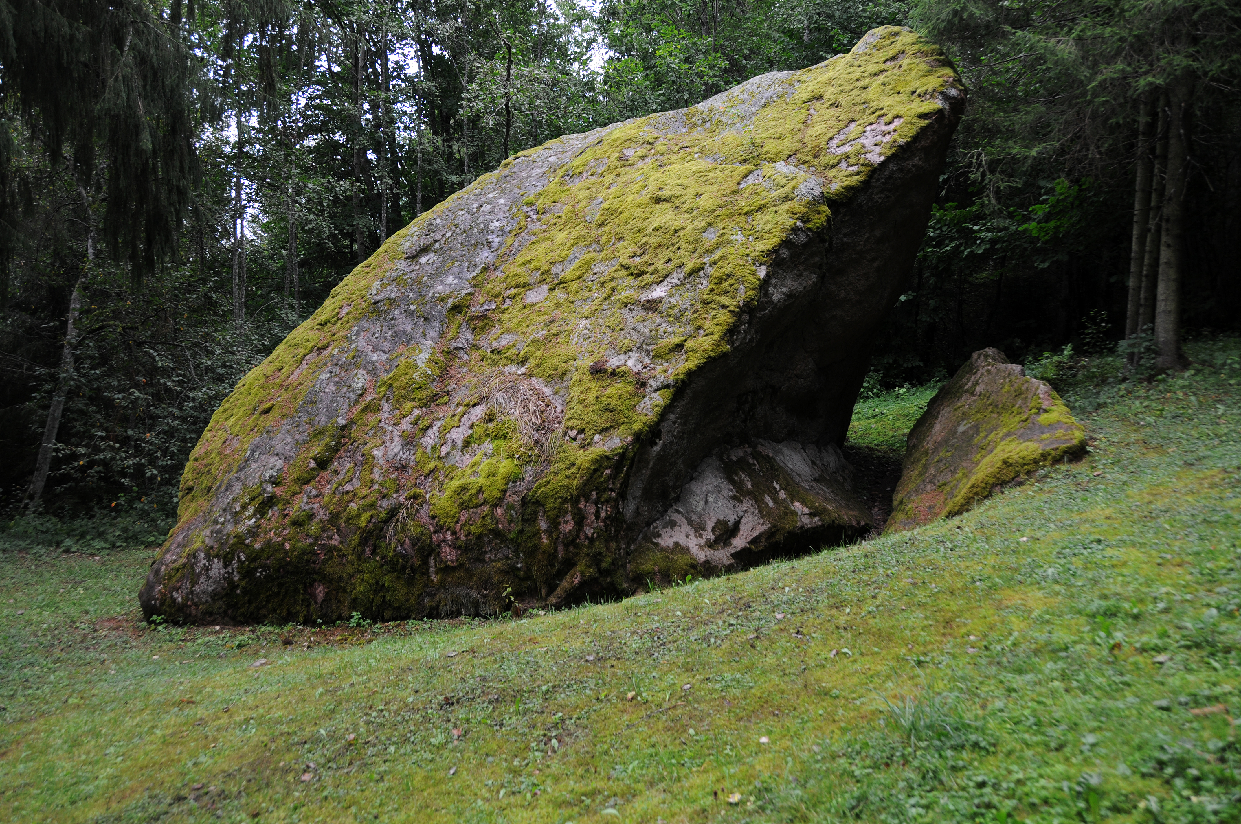 Lodikivi Kallukse mägedes